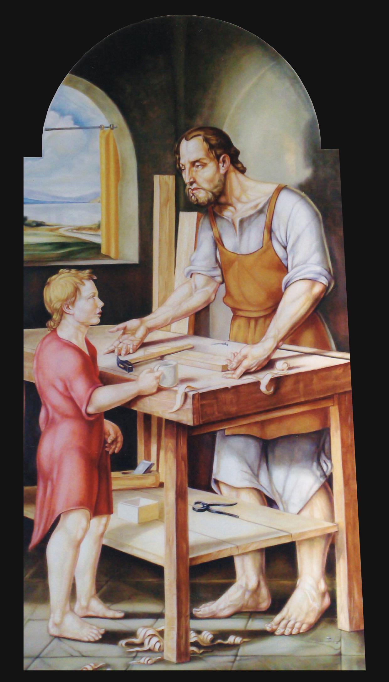 Chiesa S.S. Annunziata quadro olio su tela